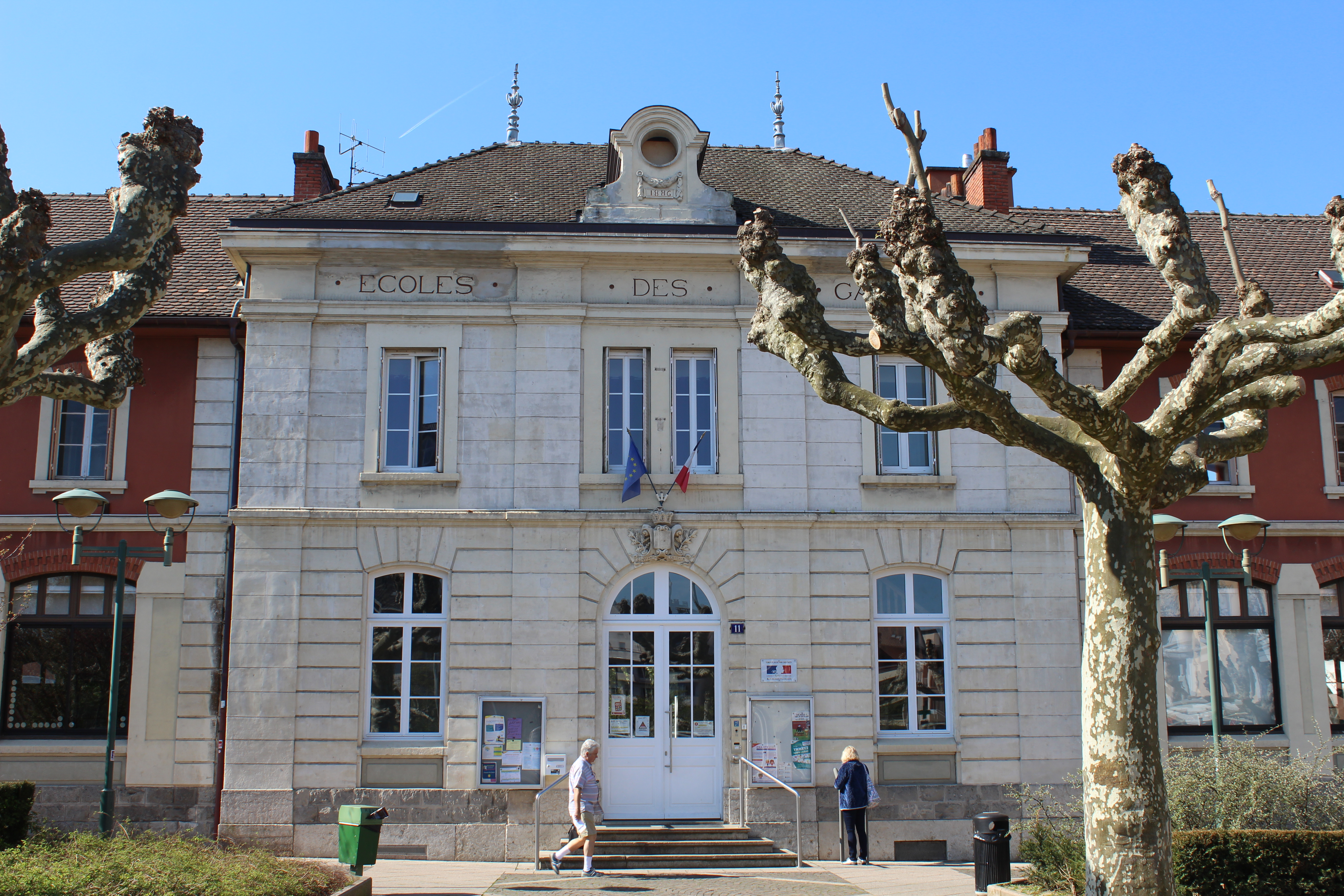 École des Arts de Thonon-les-Bains.